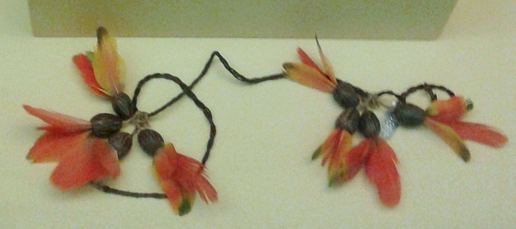 Português do Brasil: Ornato - Índios Carajá. Coletado por William Lipkind em março de 1939. Rio Araguaia, Goiás. Penas de araracanga. Acervo de etnologia indígena brasileira do Museu Nacional/UFRJ, Rio de Janeiro, Brasil.